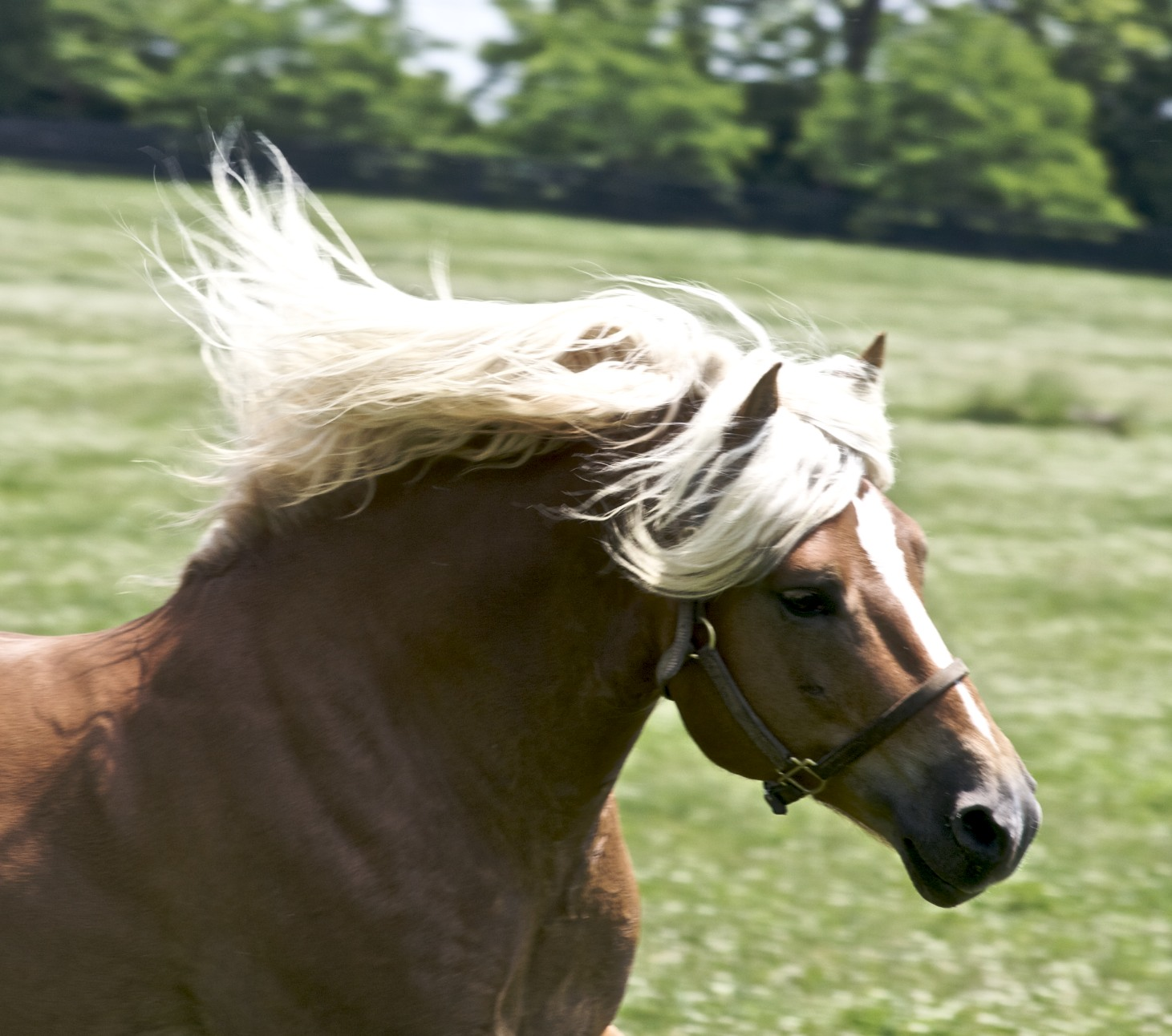 1/500, f8.0 ISO 400 Haflinger Stallion